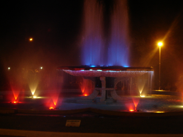 Fonte Luminosa, na cidade de Regente Feijó/SP